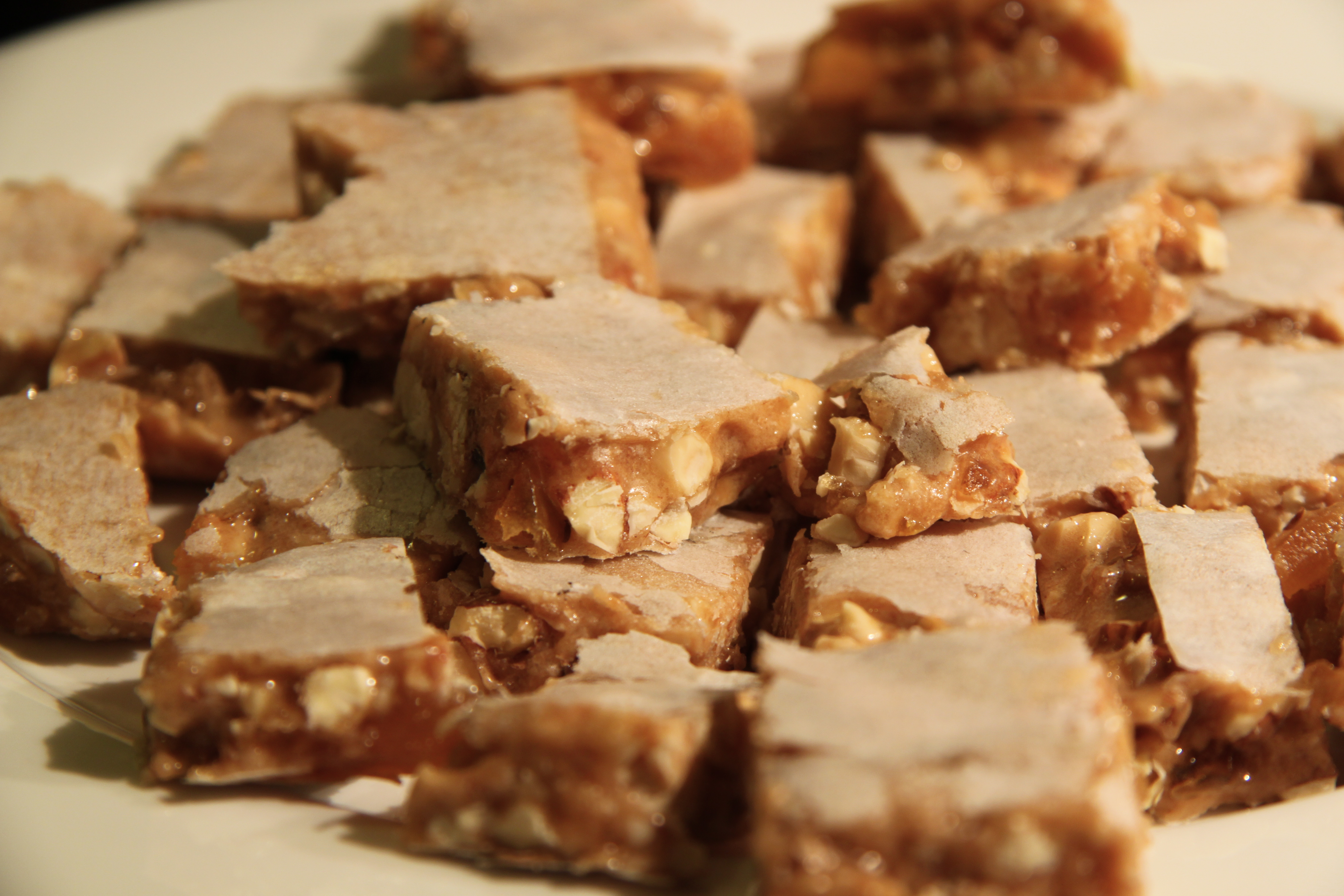 Stage 20 – Provence Avignon Liqueur: Distillerie La Salamandre, L'eau de Coing, Quince Liquor "Montélimar specialises in the making of delicious nougat, and so does Peta!"